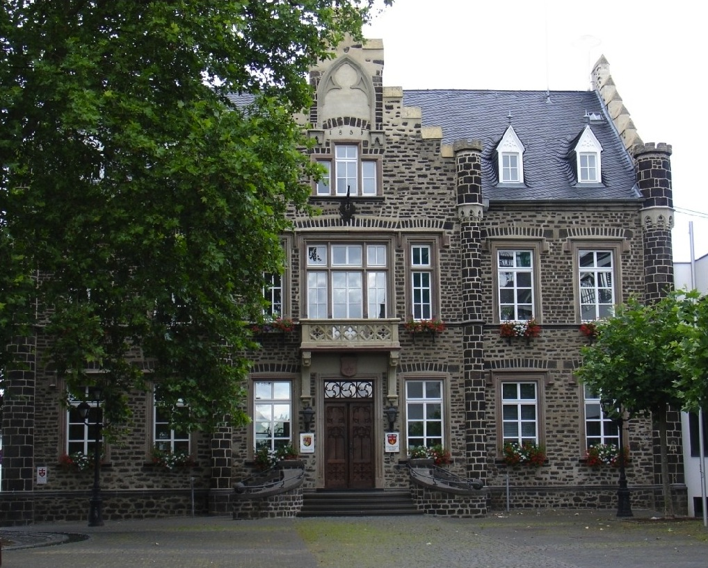 Standesamt und Bürgeramt von Polch, mitten im Ort neben der Kirche.